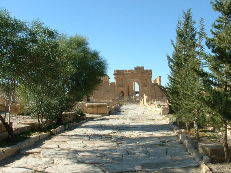 Photographie personnelle sur le site de Sbeïtla (Tunisie). Elle représente l'arc de triomphe d'Antonin. De part et d'autres de la rue dallée se trouvaient des boutiques